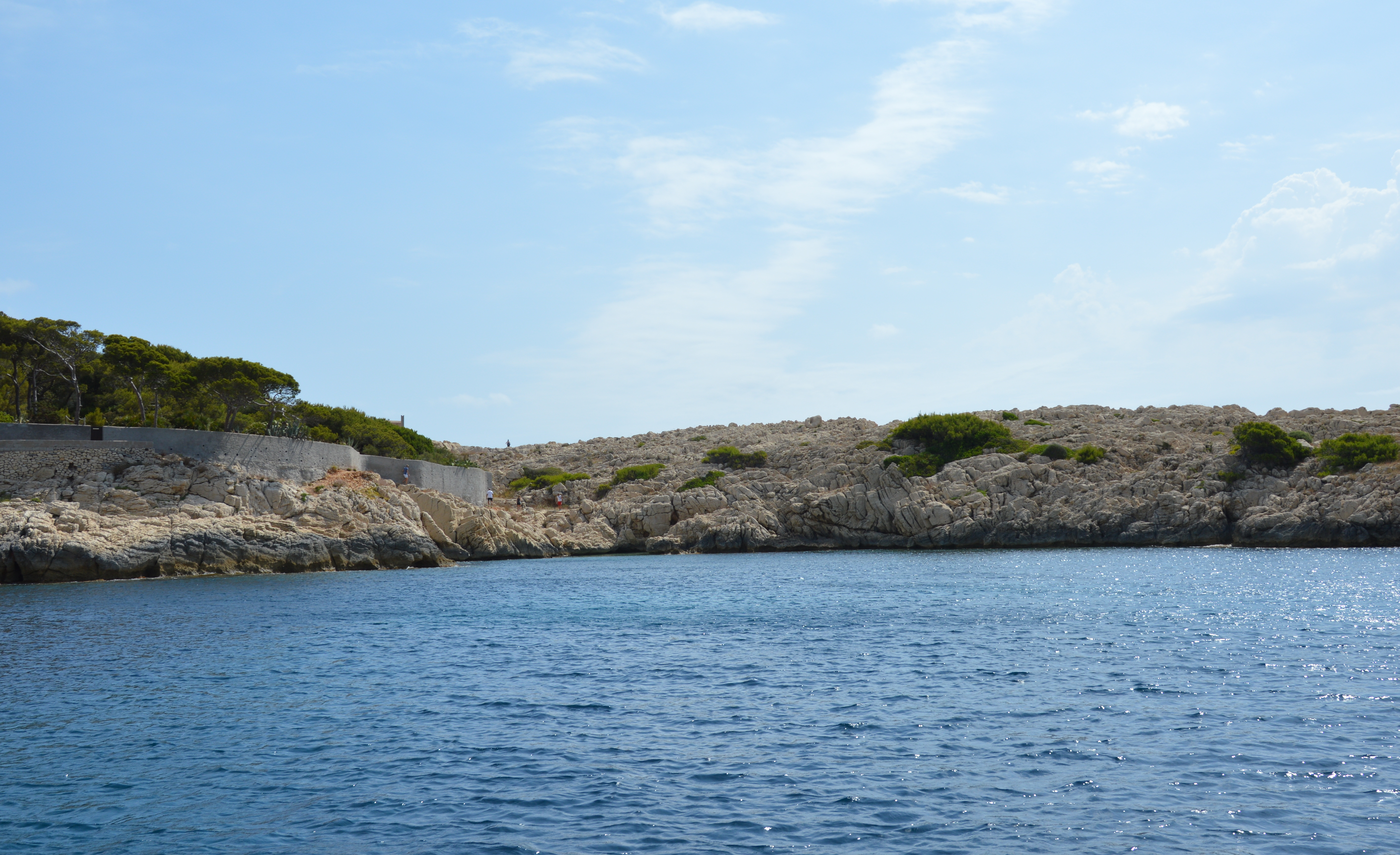 S Almadrava